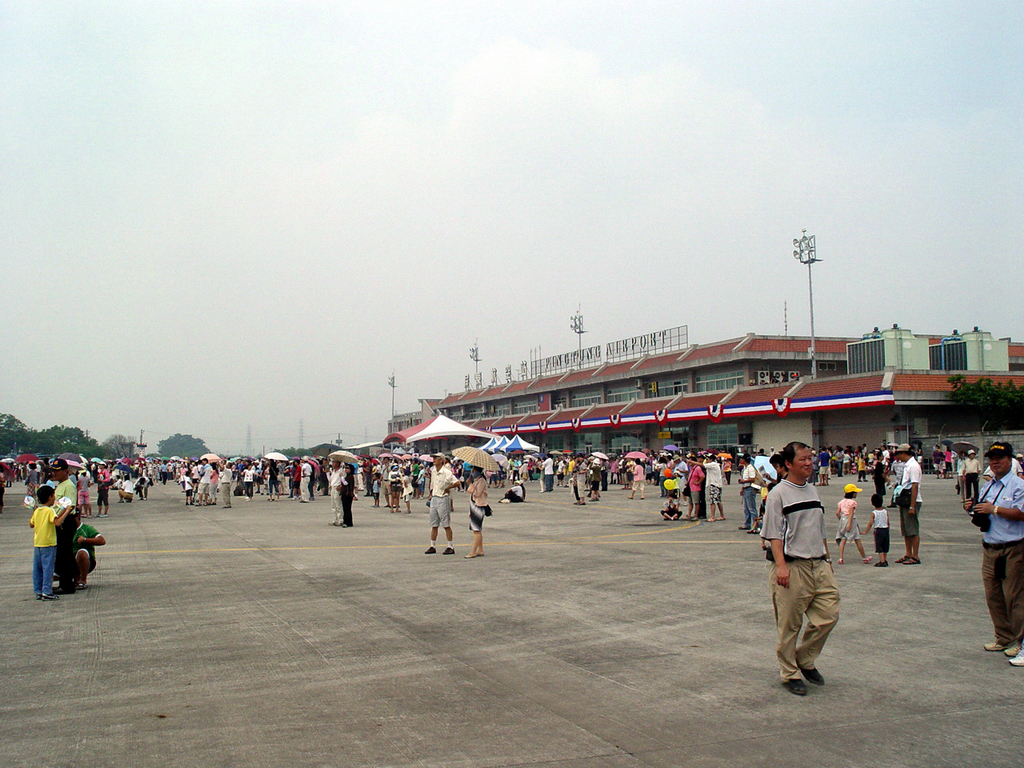 中文（台灣）: 屏東市屏北機場的航站大樓。